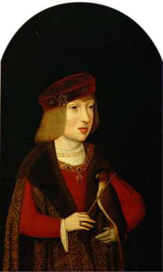 Kaiser Karl V. (1500-1558) als Siebenjähriger mit einem Jagdfalken, Halbfigurenbild